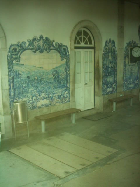 Estação ferroviária do Bombarral